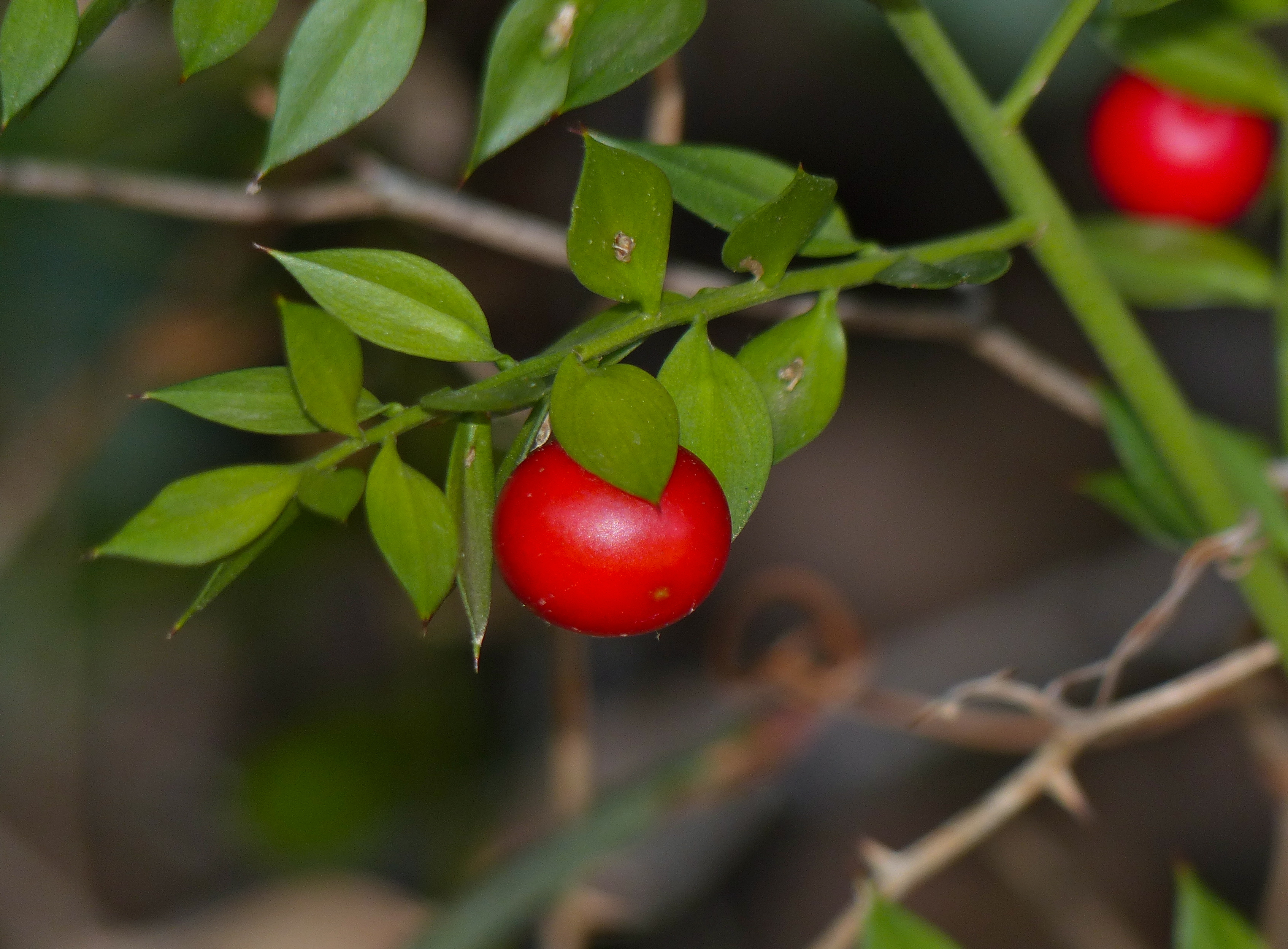 Valcrose, Aniane, Hérault, FRANCE